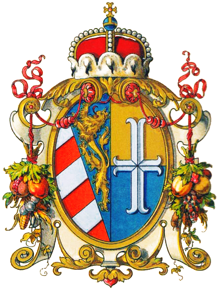 Wappen der Gefürsteten Grafschaft Görz Gradisca Görz: Schrägrechts gespalten; vorn von Silber und Rot fünfmal schräglinks gespalten, hinten in Blau ein gekrönter goldener Löwe. Gradisca: Von Gold über Blau geteilt, darüber ein silbernes Ankerkreuz.